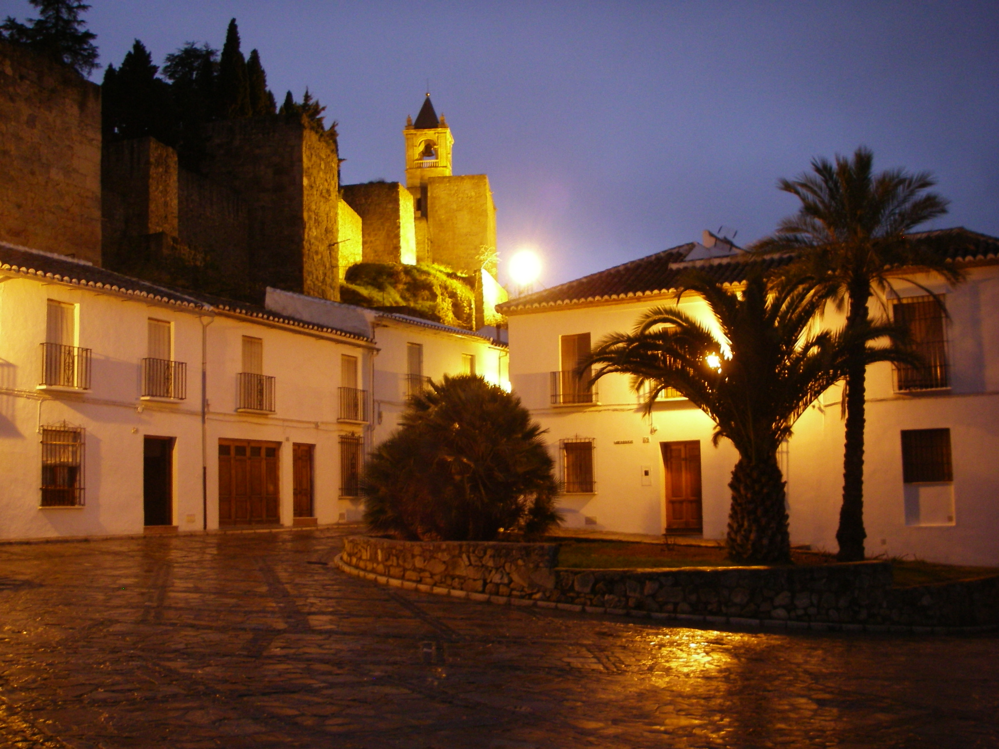 Abendliche Aufnahme der Alcazaba oberhalb der Altstadt von Antequera in Andalusien, Spanien.